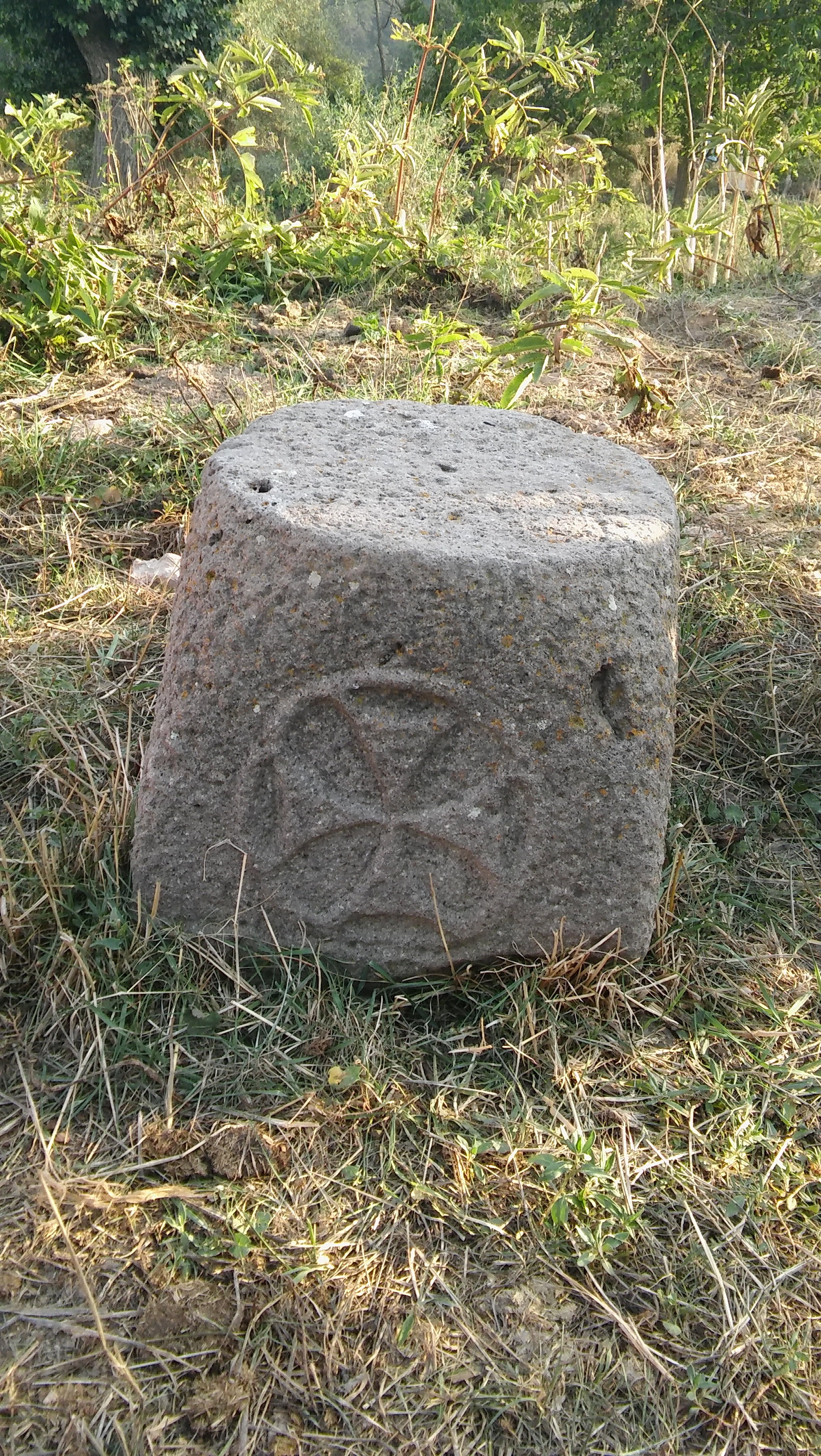 Ovacık Sofuğlu köyüne ait tarihi kilise kalıntısı.Köyün artık faal olmayan okul binasının bahçesinde bulunmakta